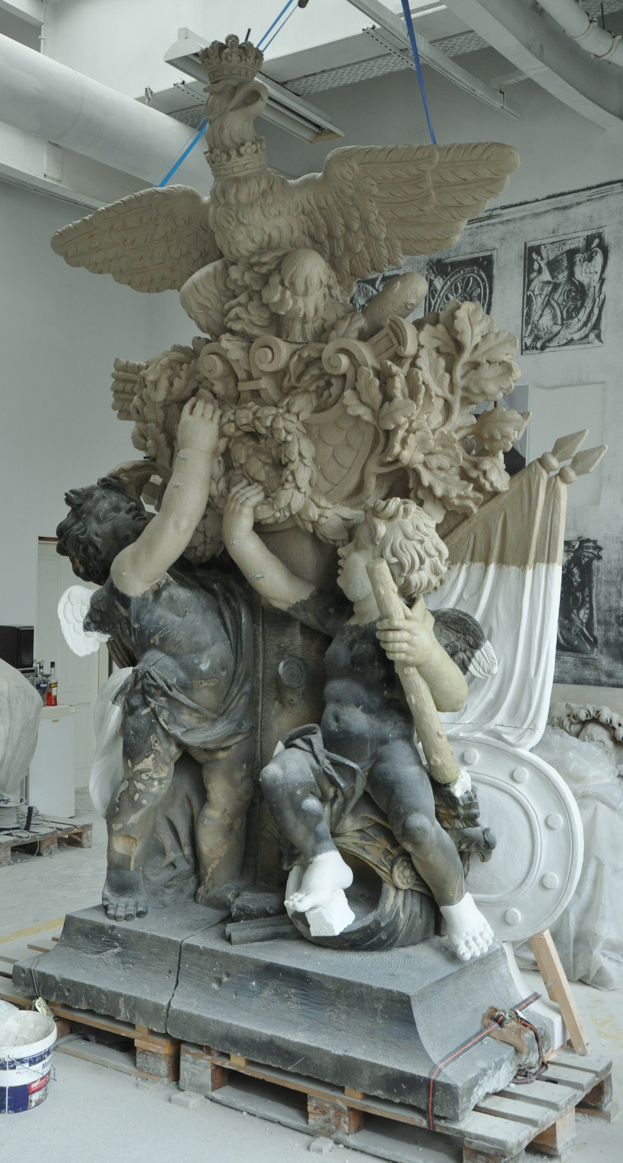 Adlergruppe des Fortunaportals des Potsdamer Stadtschlosses